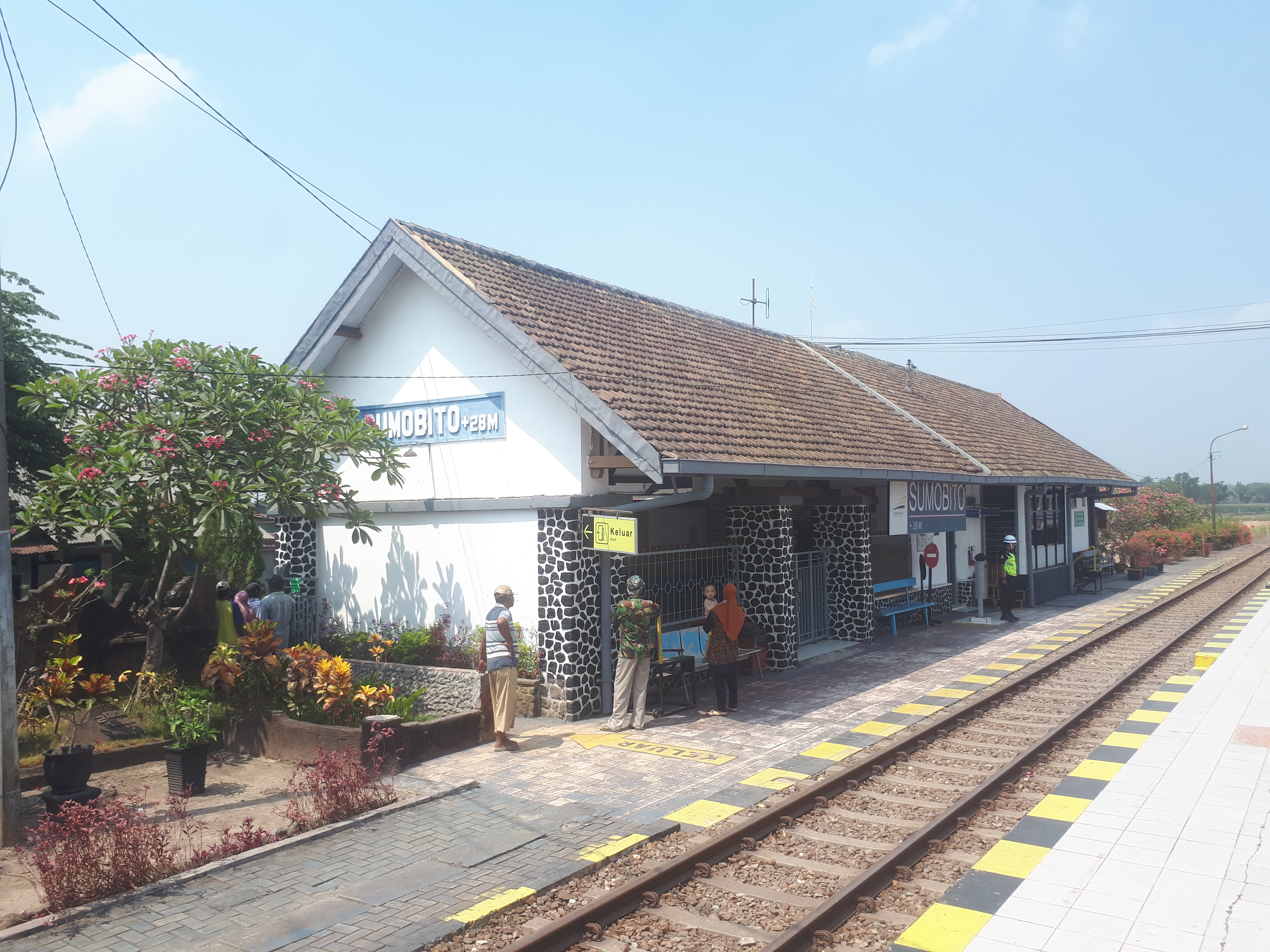 Stasiun Sumobito tahun 2019.